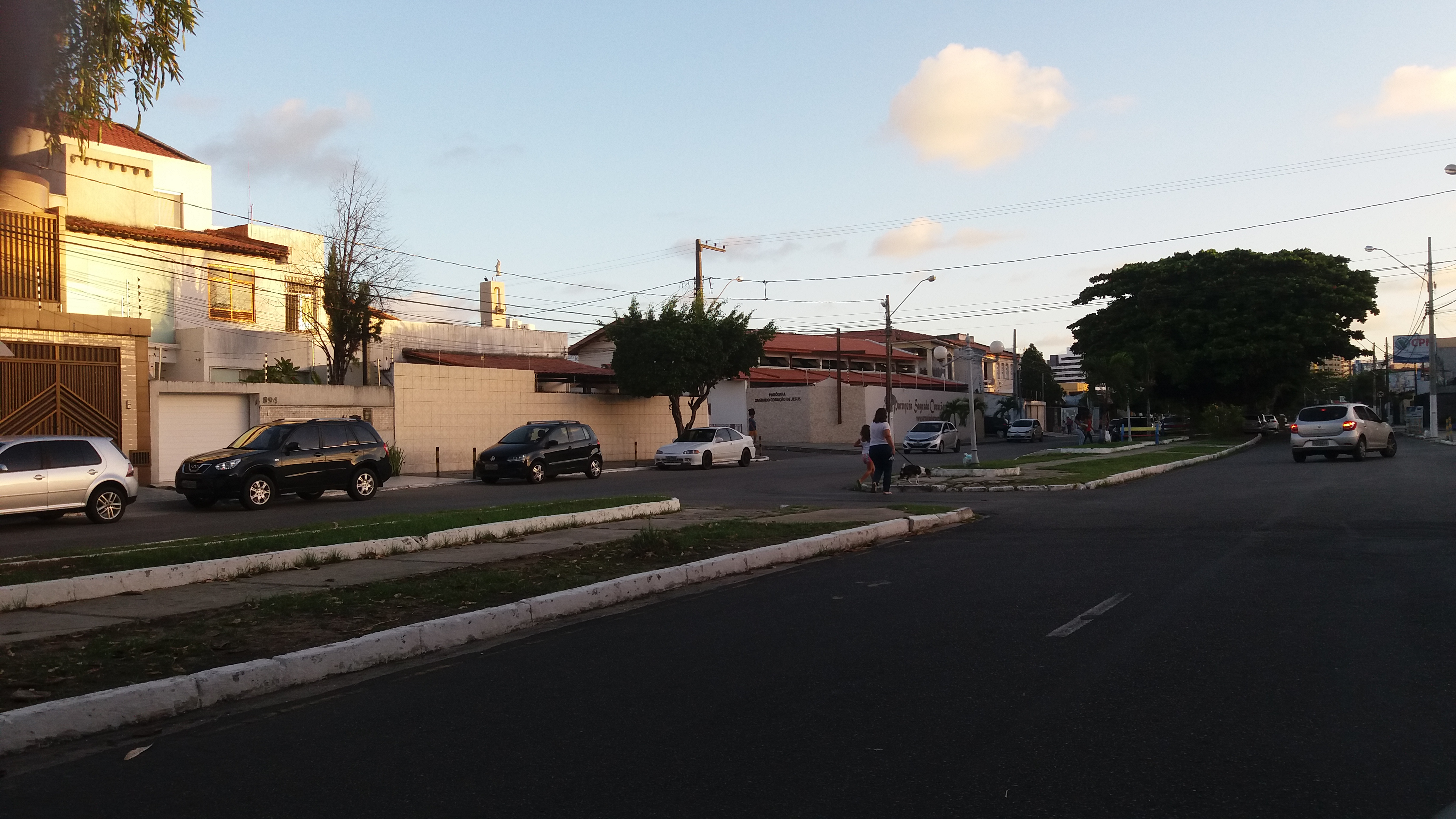 Avenida Pedro Paes Azevedo, Grageru, Aracaju-SE, Brasil